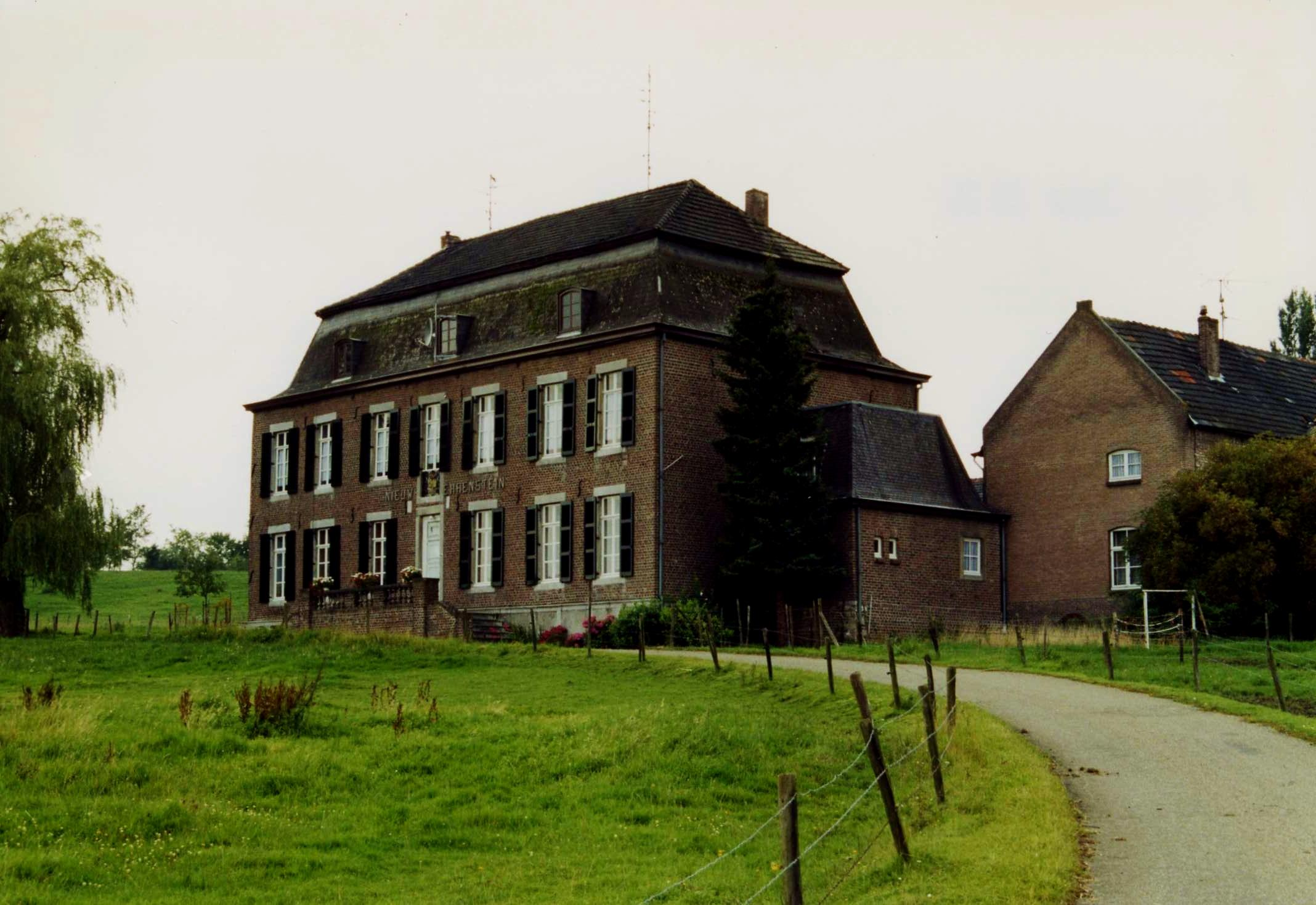 Huis Nieuw-Ehrenstein te Kerkrade.